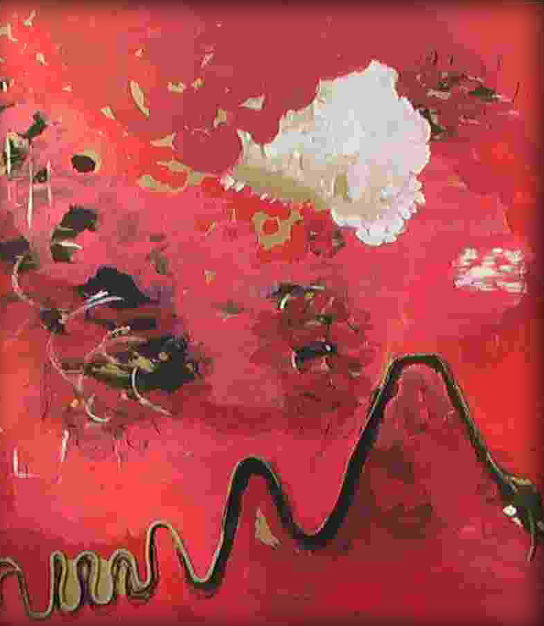 Kaart van Egypte van CIA World Factbook, enkel verkleind, en het Sinai schiereiland met een rode rechthoek aangegeven